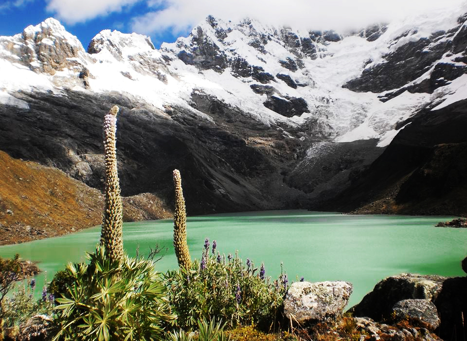 Laguna Allicocha a 4560 msnm.